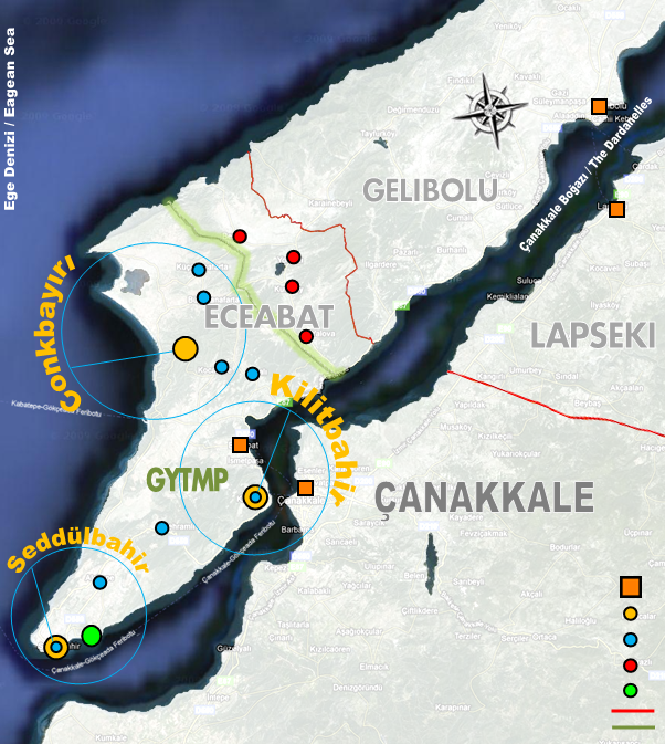 GYTMP Haritası / Gelibolu Yarımadası Tarihi Milli Parkı Haritası